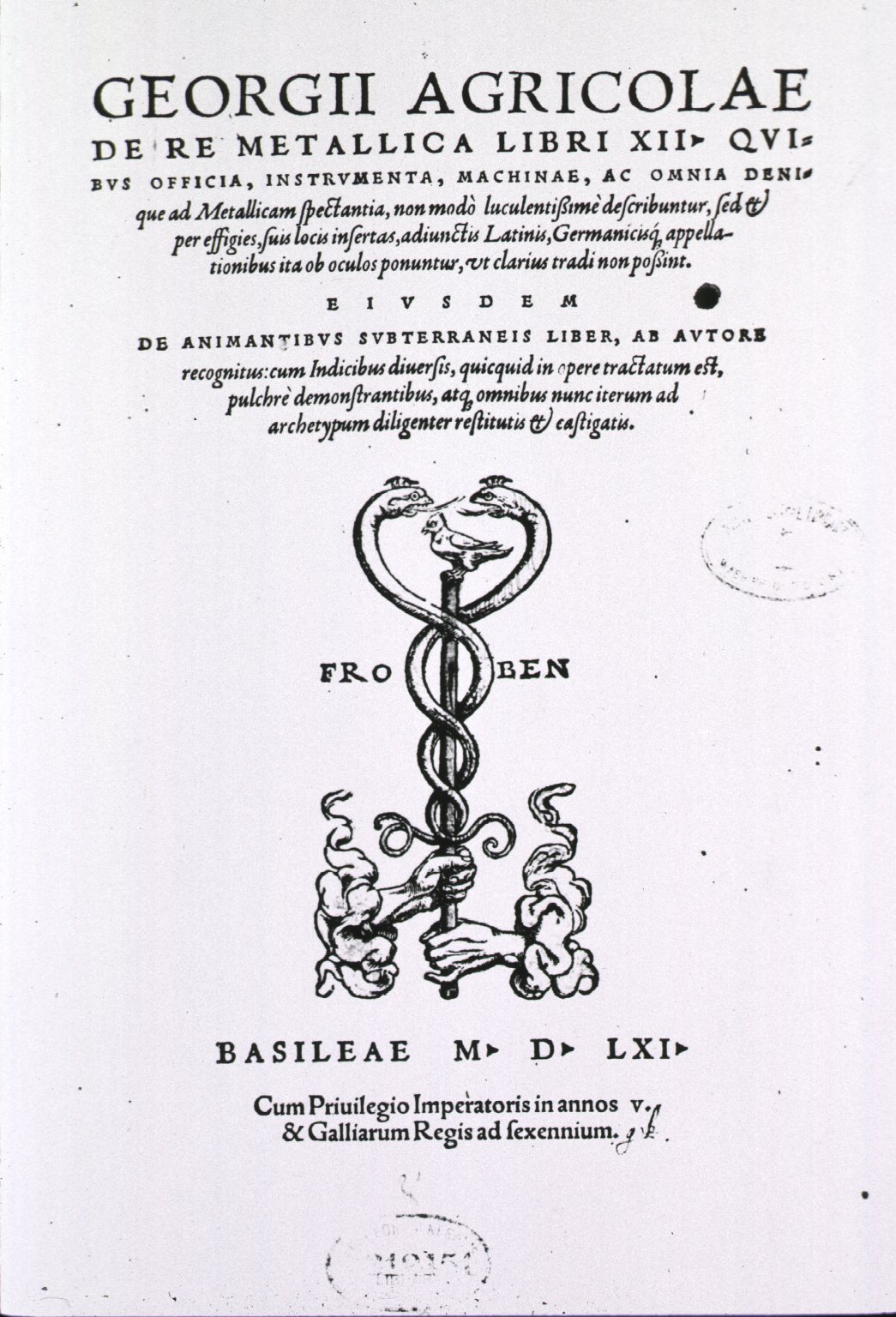 De re metallica title page